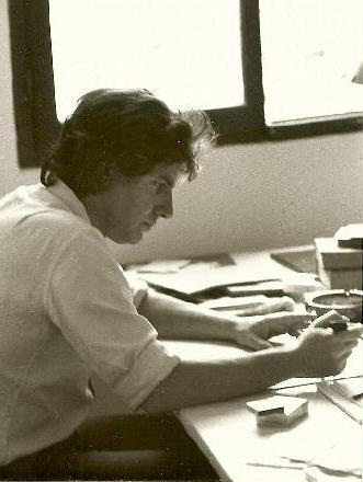 Foto Gaston Salvatore